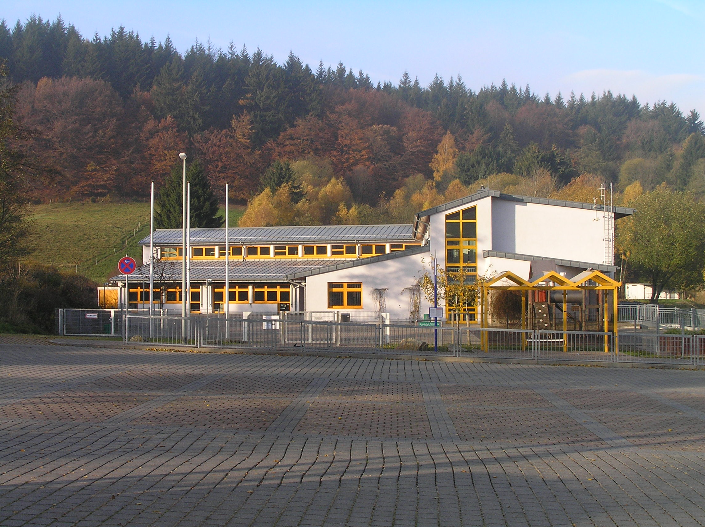 Grundschule Reifenberg in Niederreifenberg von der Straße aus